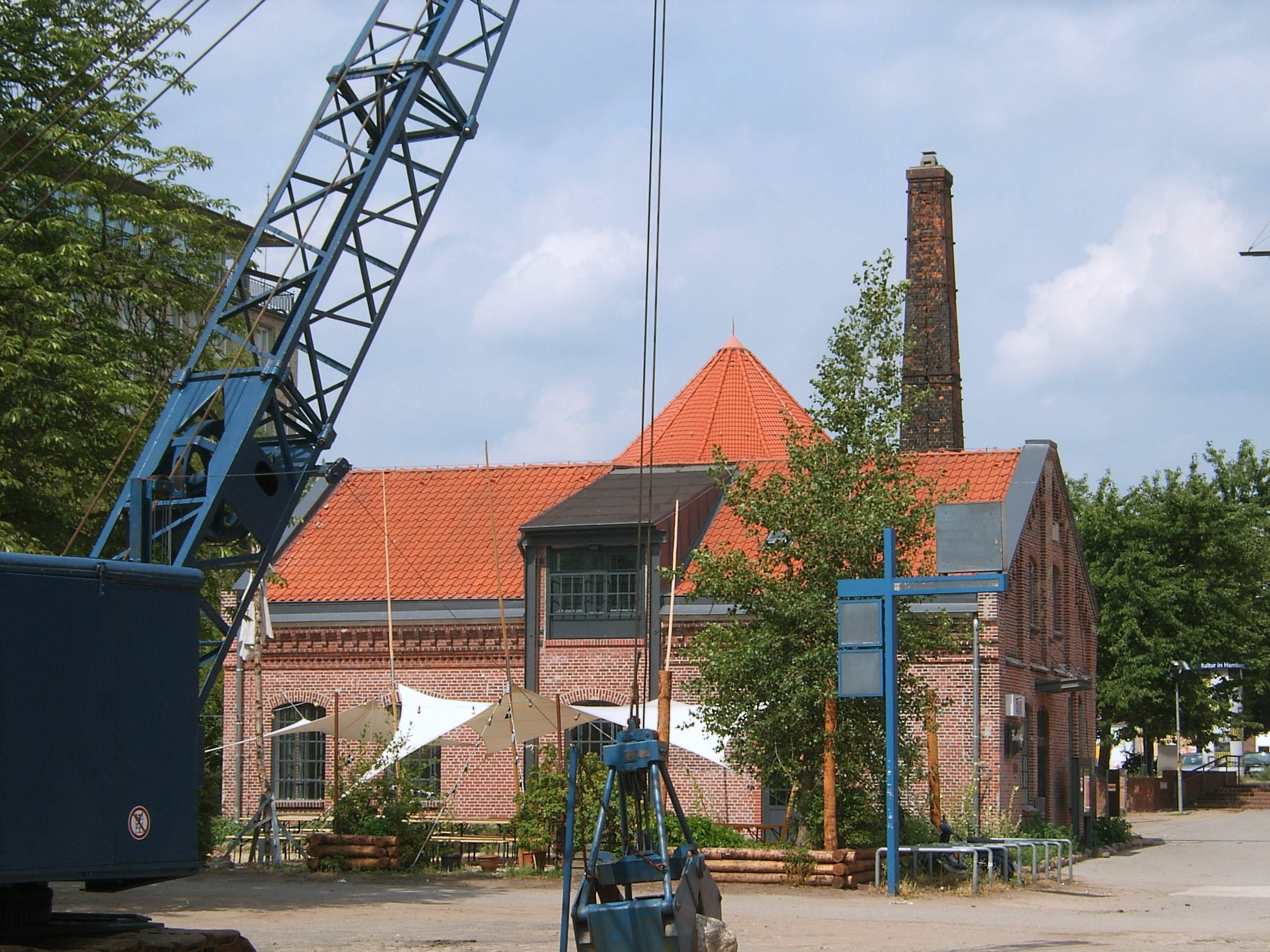 Hamburg, Barmbek, Zinnschmelze